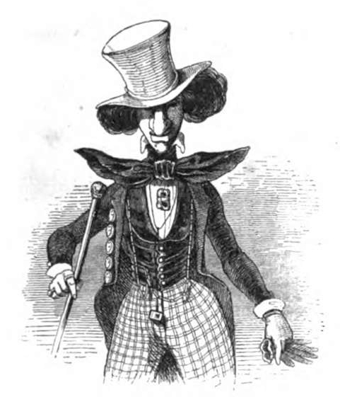 Fliegende Blätter, Volume 1, image on page 61